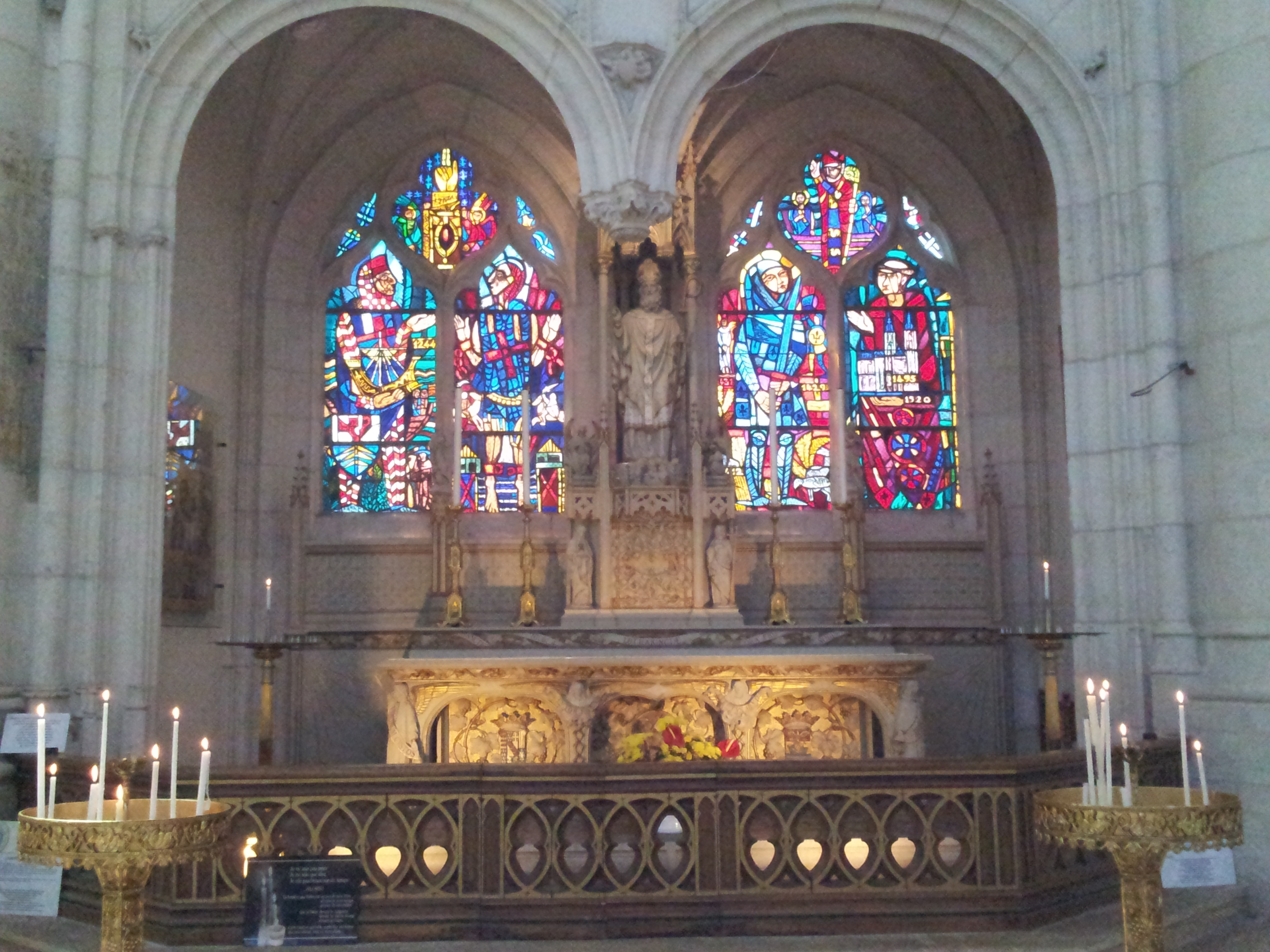 Chapelle Saint-Nicolas, située dans le collatéral sud de la basilique Saint-Nicolas à Saint-Nicolas-de-Port. Le vitrail de la fenêtre à l'extrême gauche représente Jean, sire de Joinville, sénéchal de Louis IX. Au dessus, une représentation du bras reliquaire contenant la phalange de Saint-Nicolas.